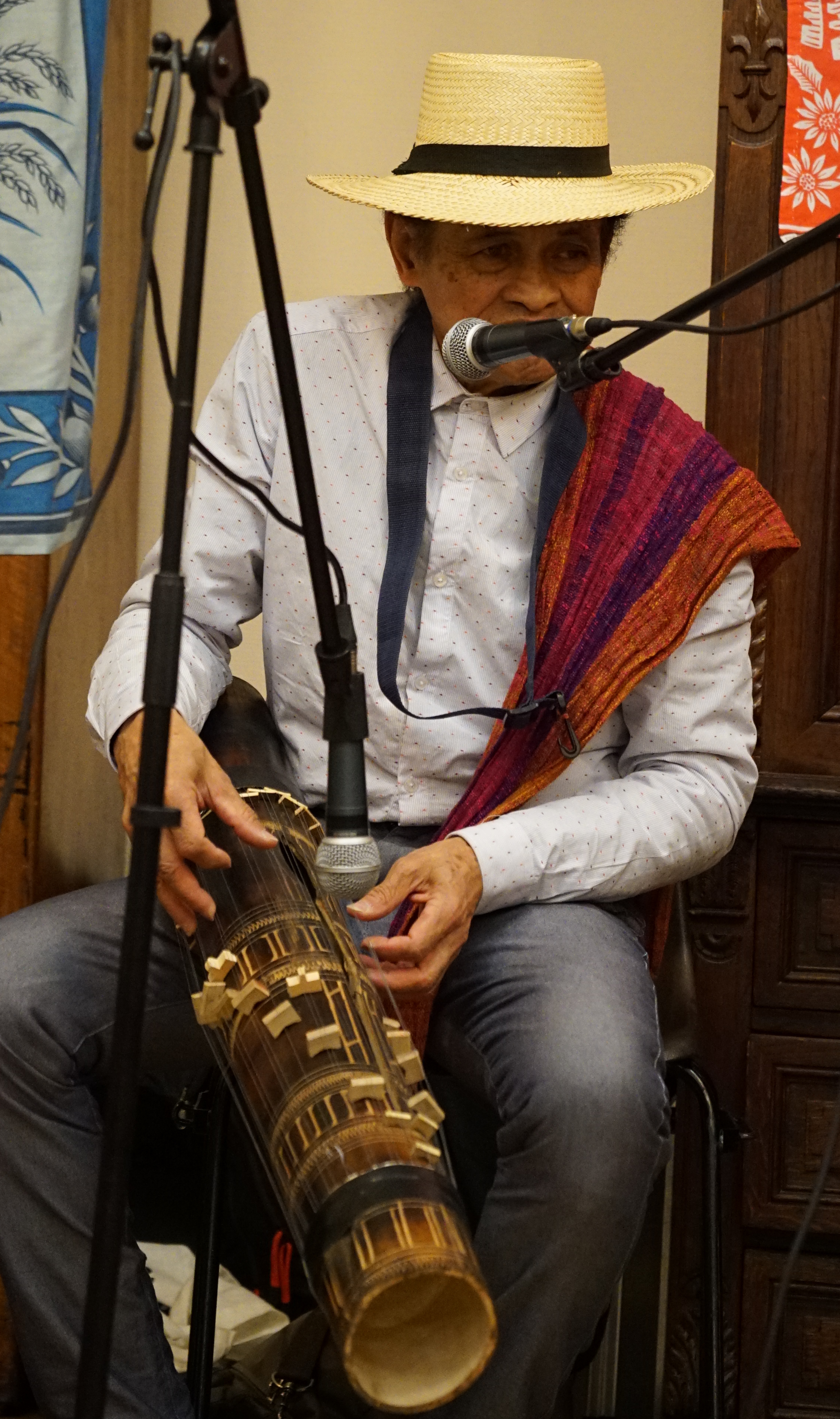 concert à Reims.